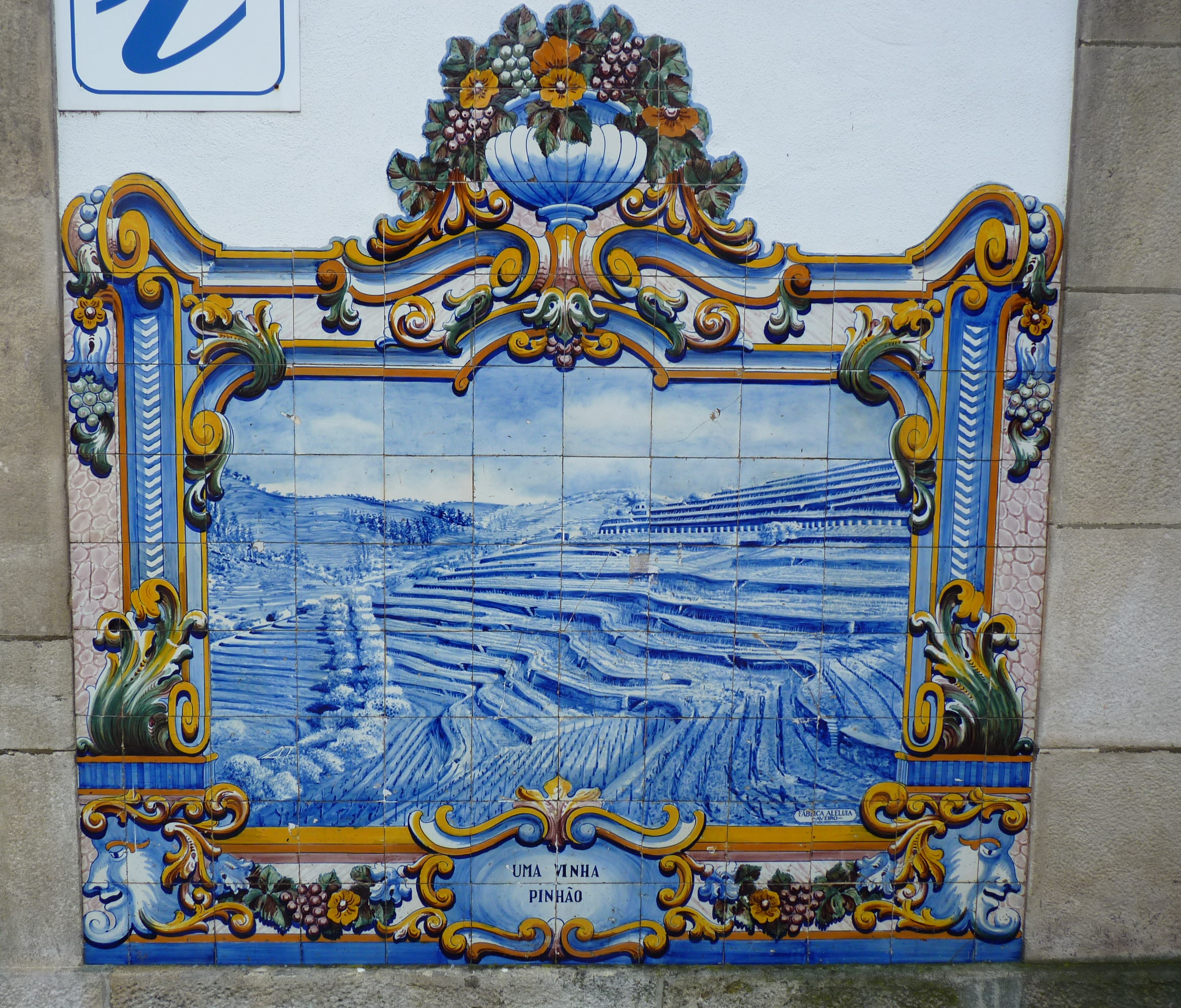 Alto Douro Vinhateiro